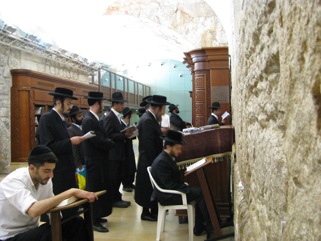 אברכי כולל שומע תפילה בכותל המערבי, באמירת נשמת כל חי בחצות הלילה, לאחר לימוד ותפלה של כשעתיים